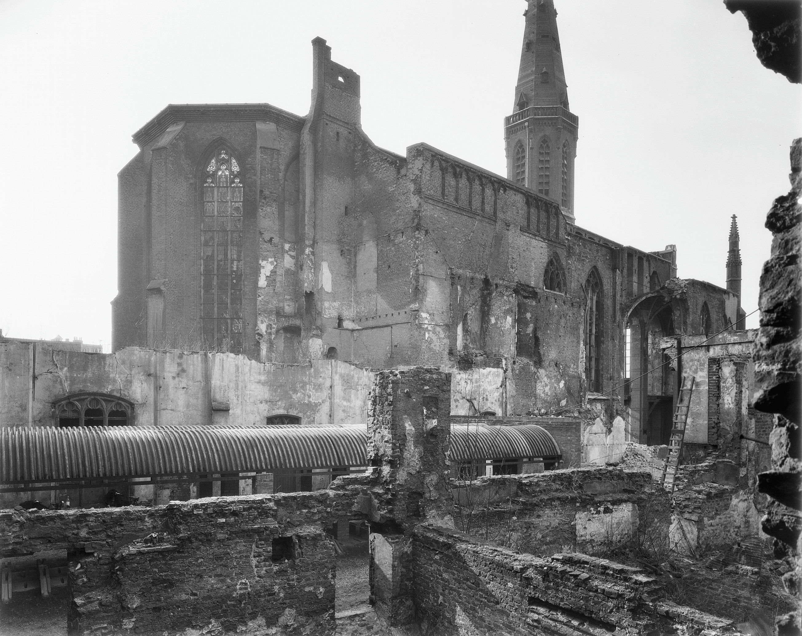 Broeren Kerk: kort voor de afbraak